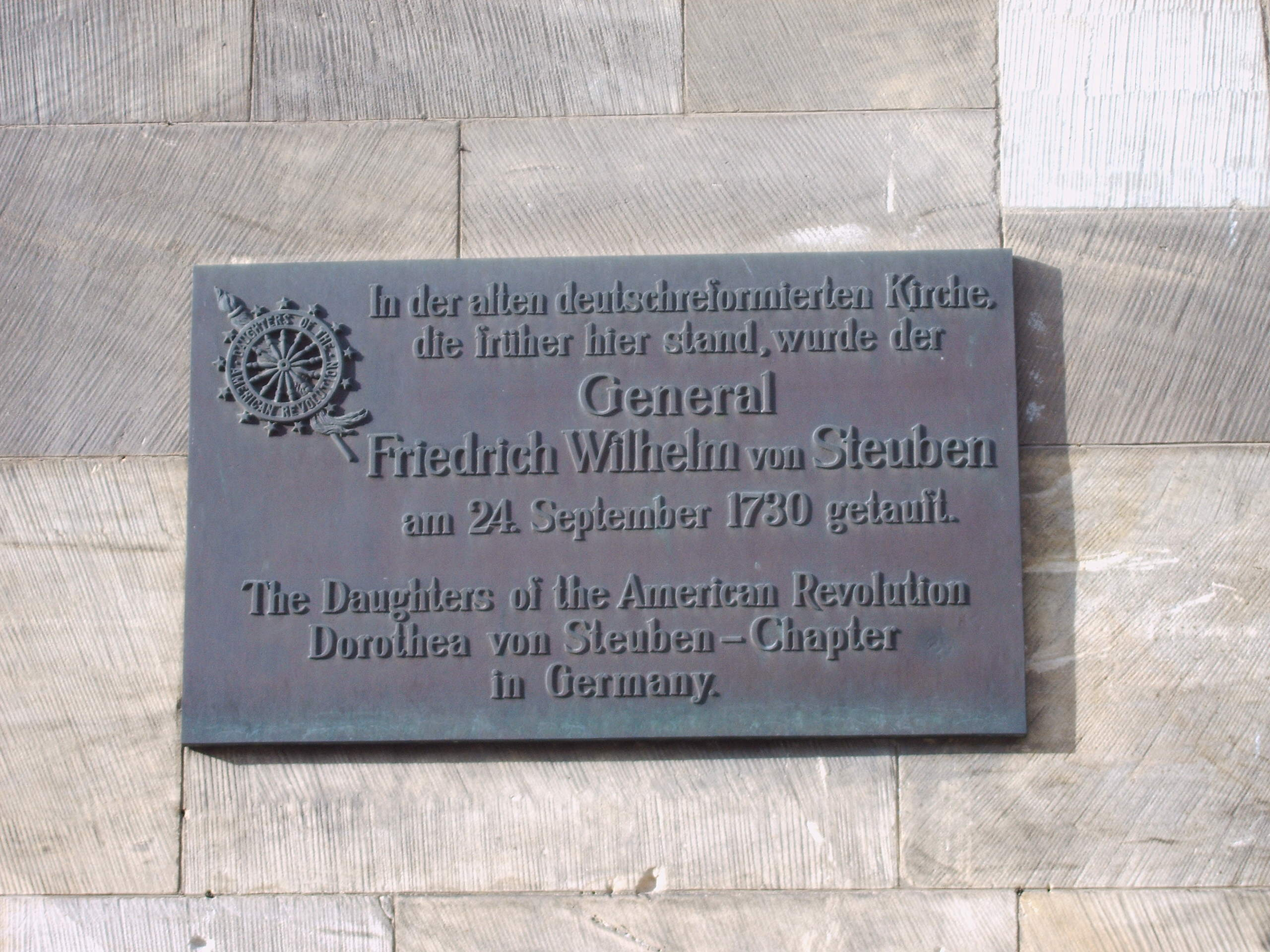 Gedenktafel in Magdeburg, Breiter Weg, an die Taufe von Friedrich Wilhelm von Steuben am 24.9.1730 in der dort ehemals befindlichen deutsch-reformierten Kirche Bild aufgenommen am 18.11.2005 durch Olaf2